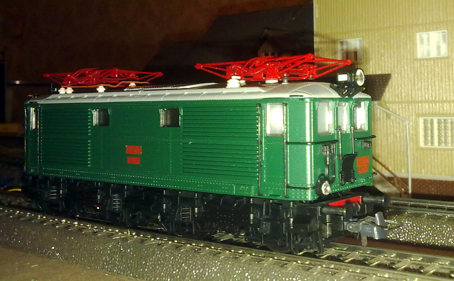 Reproucció a escala 1/87 de la locomotora de la sèrie 1000 d'Estado (posteriorment 281 de Renfe) del fabricant Roco.